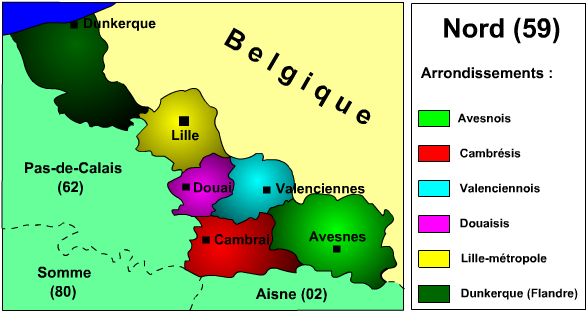 Carte du département du Nord (59) avec délimitation des arrondissements Utilisateur:Manchot sanguinaire